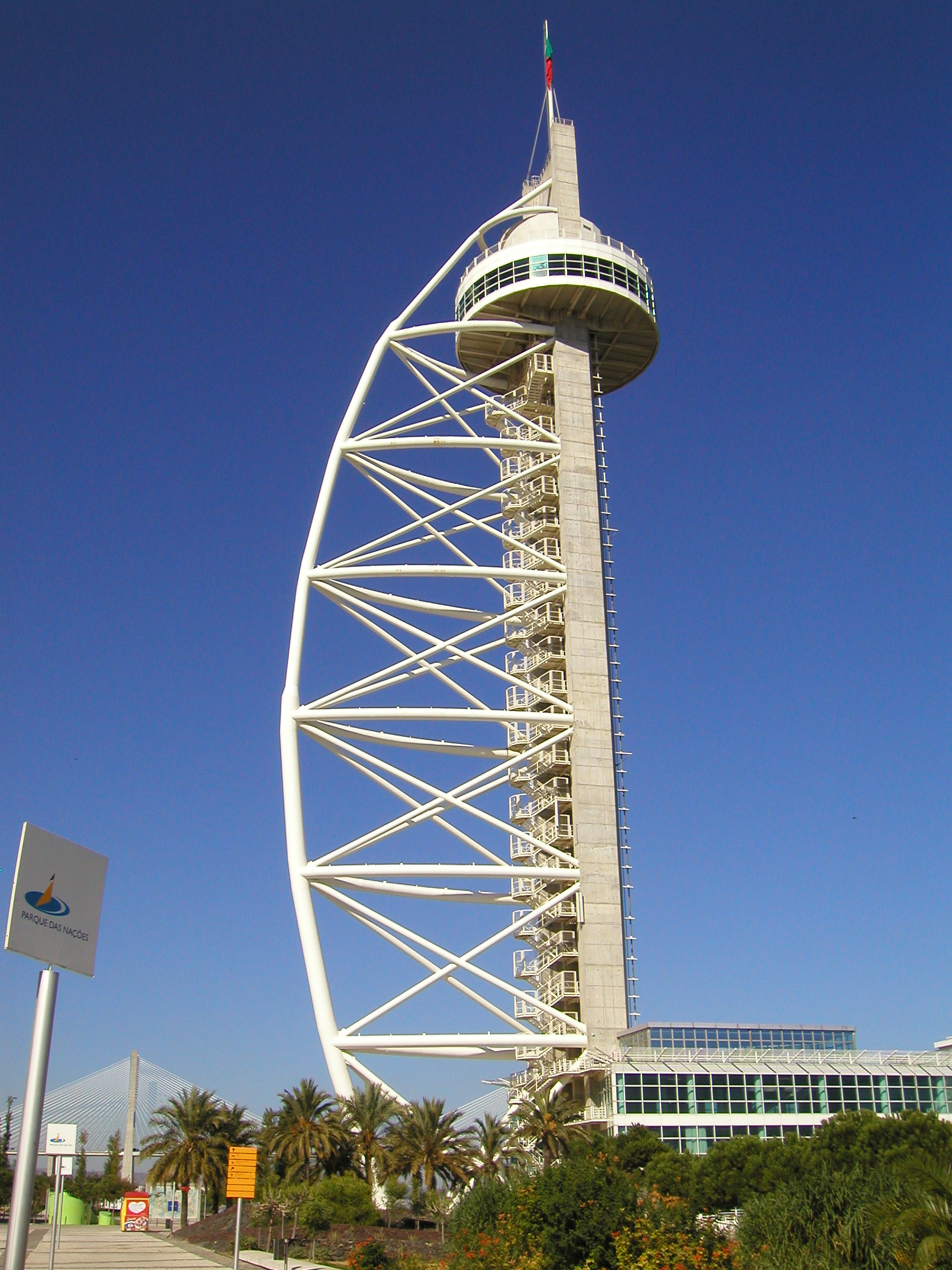 Selber aufgenommenes Bild des Turmes im Herbst 2003